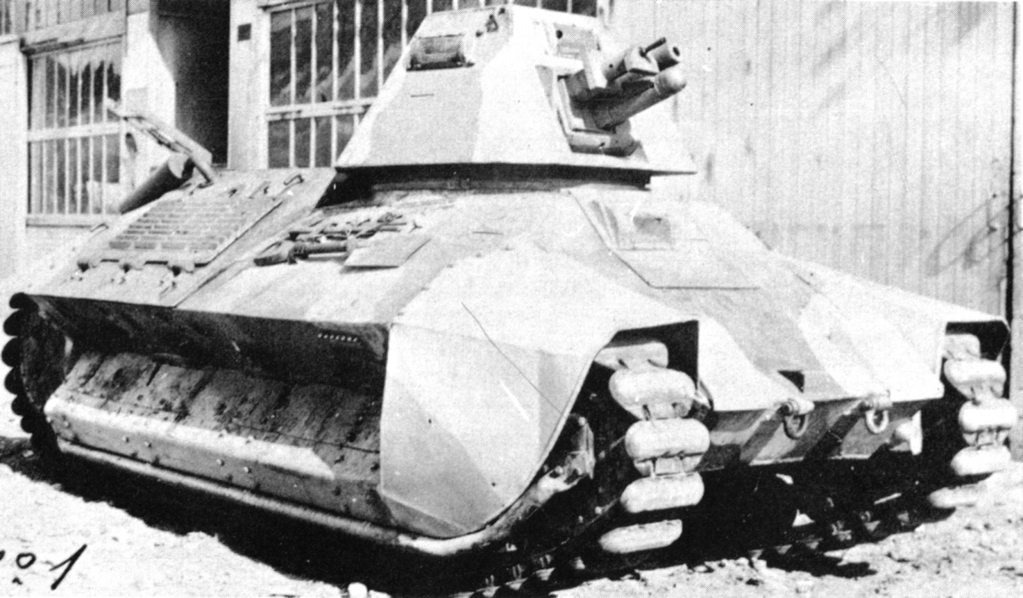 Digitale reproductie foto van het verbeterde prototype van de FCM36 tank